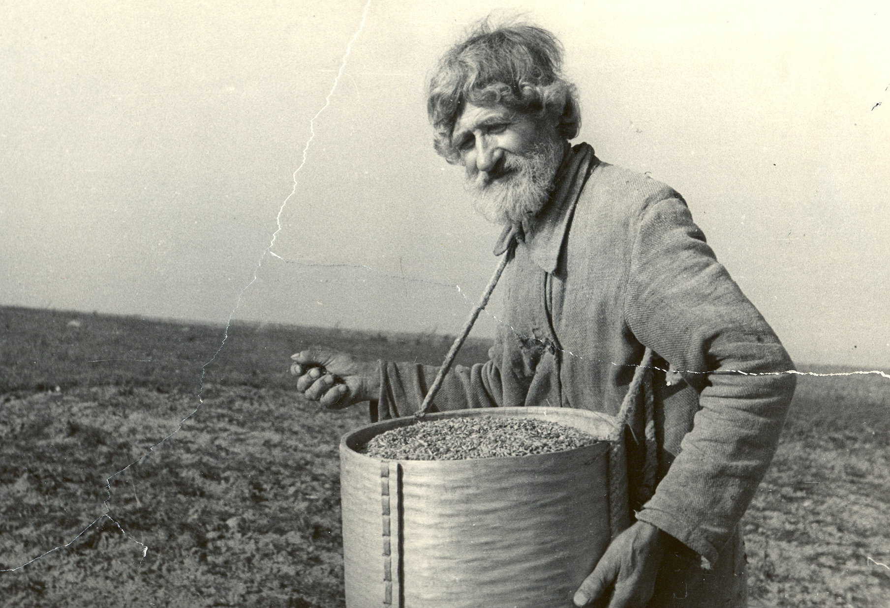 Сеятель. Фото А. В. Скурихина